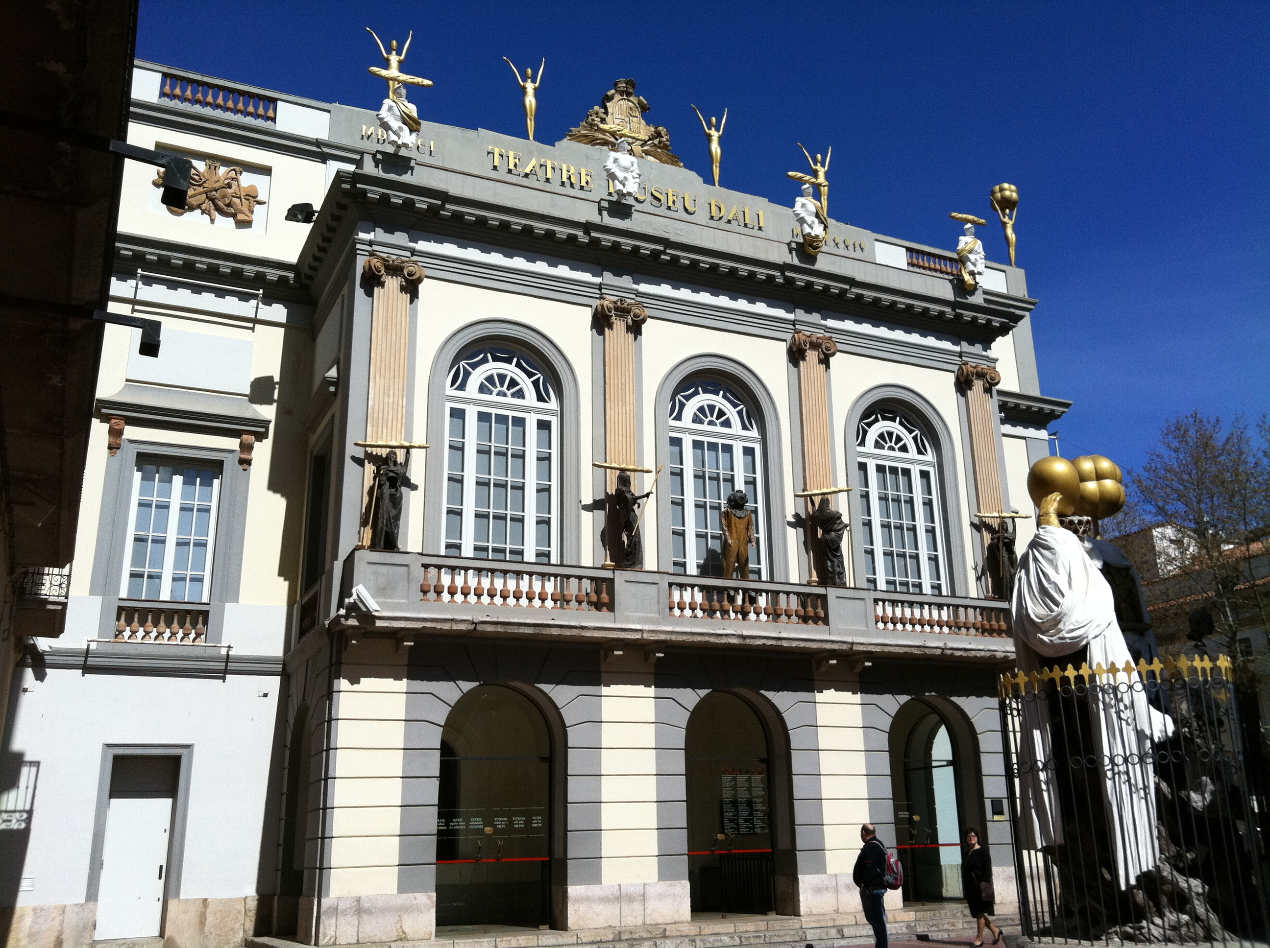 Façana del Teatre Museu Dalí de Figueres